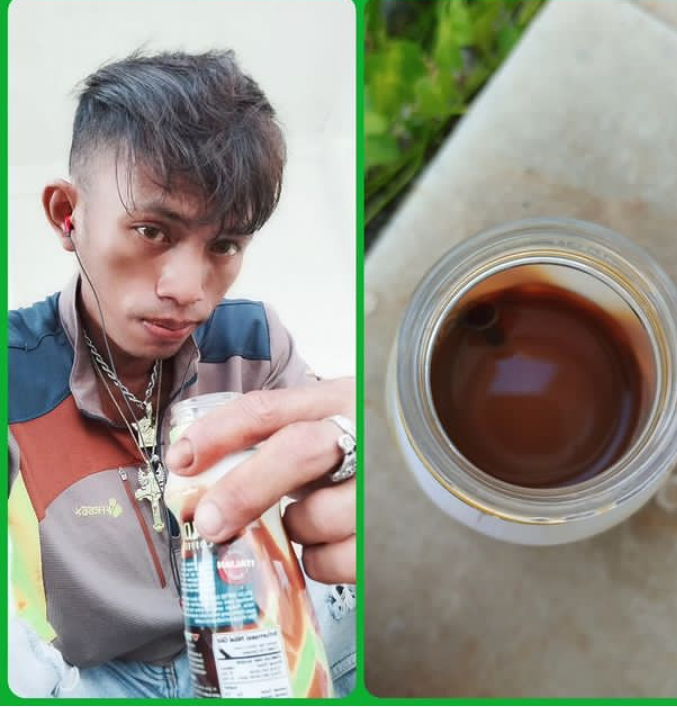 Hernán clavito godoy entrenador de futbol.